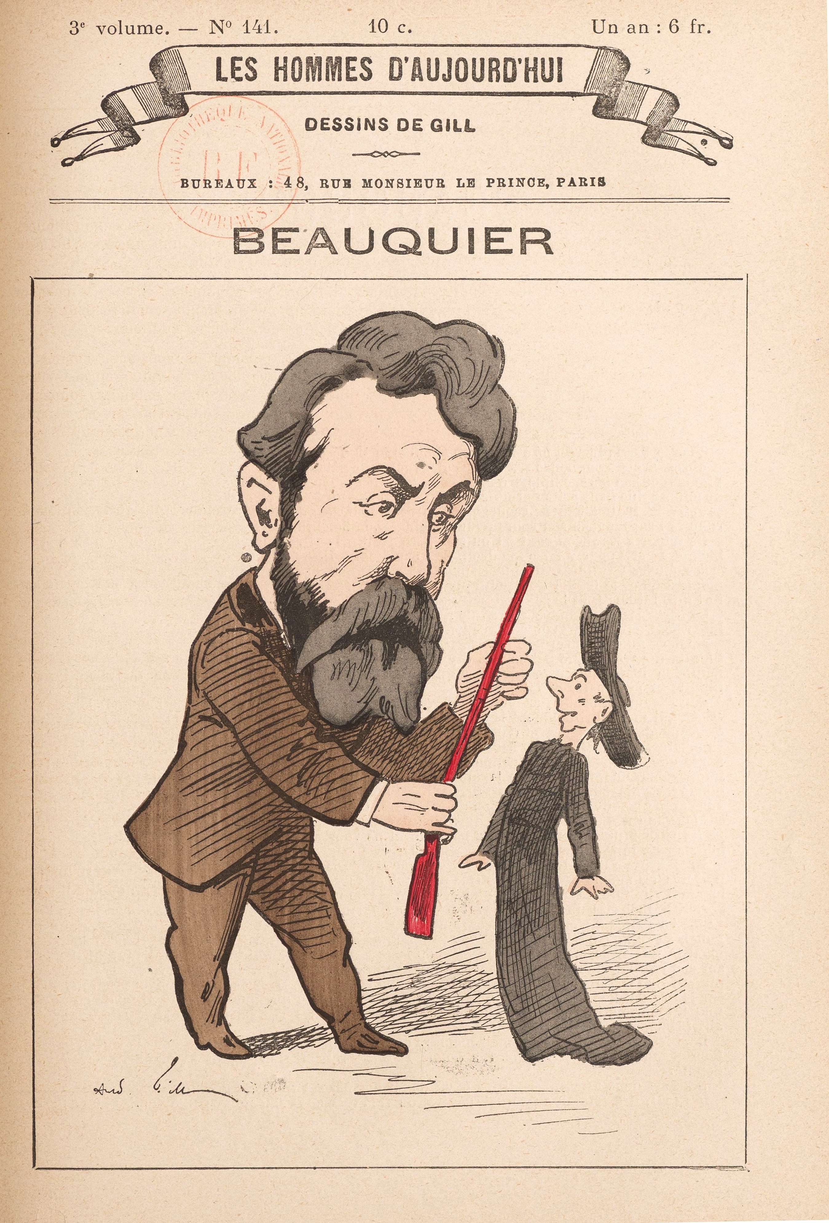 Charles Beauquier, caricature par André Gill, Les Hommes d'aujourd'hui, n°141, 1881.